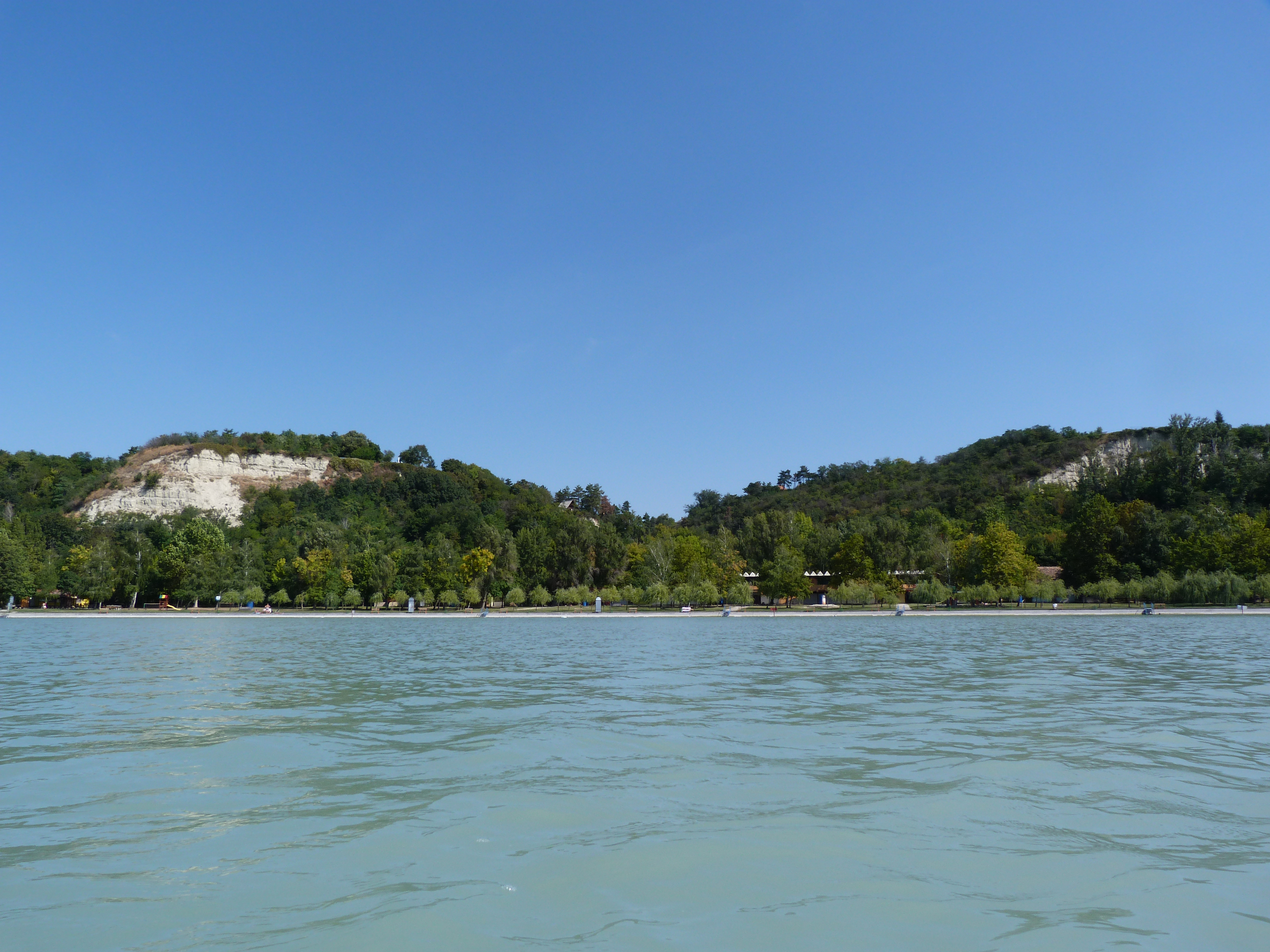 A felvétel 2013. szeptember 6 -án, pénteken készült Balatonakarattyán, a Bercsényi strandról.(a vízből fényképezve). ©© Derzsi Elekes Andor, Budapest, 2013, You are authorised to use these photos and vids under Creative Commons – even for commercial, for profit purposes. Photos must be attributed to Derzsi Elekes Andor. All of the photos and vids in the Metapolisz DVD line are under Creative Commons and can be used even for commercial – for profit – purposes. Recommended Citation Derzsi Elekes Andor: Metapolisz DVD line